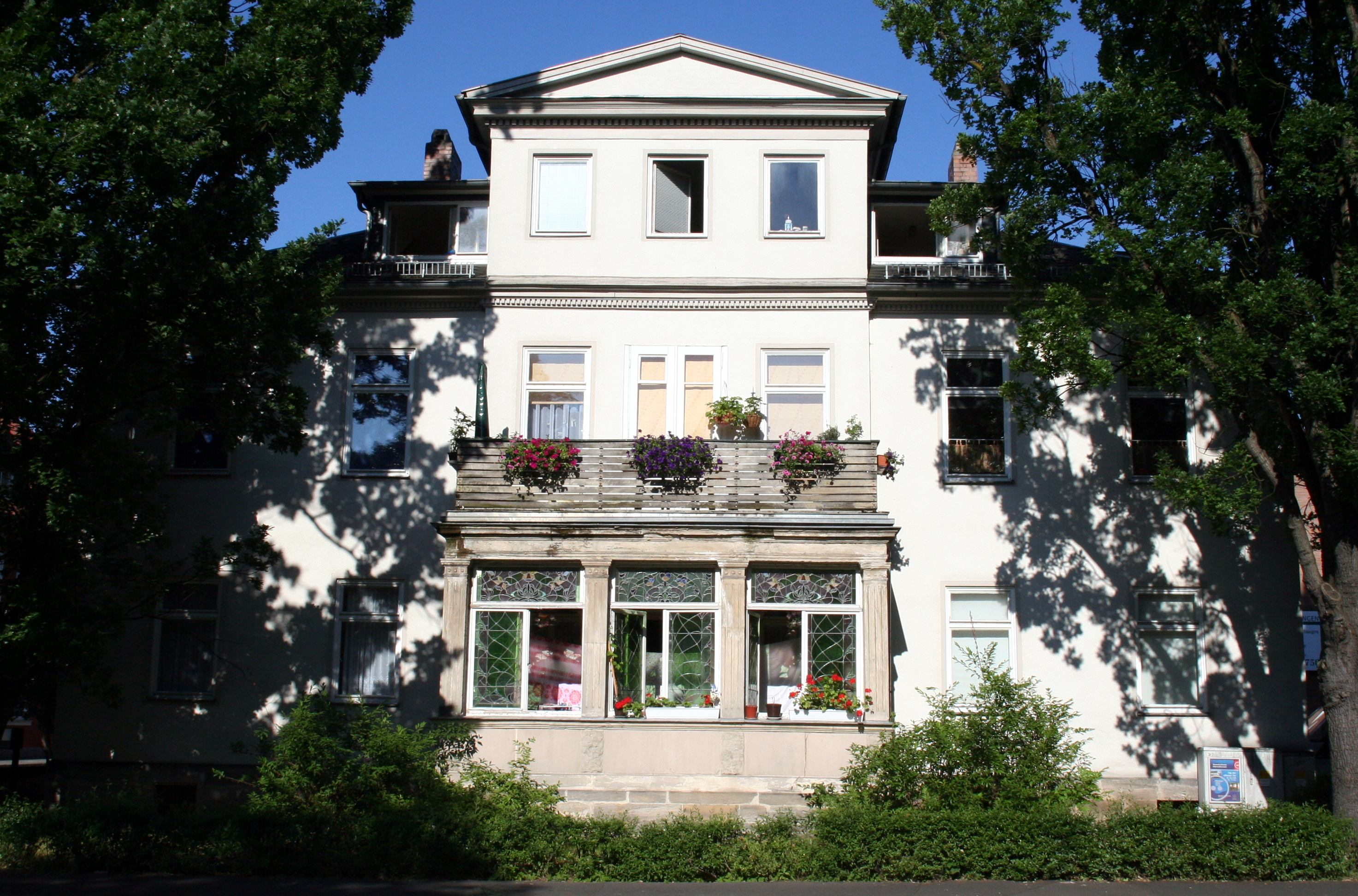 Ketschendorferstraße 2 in Coburg